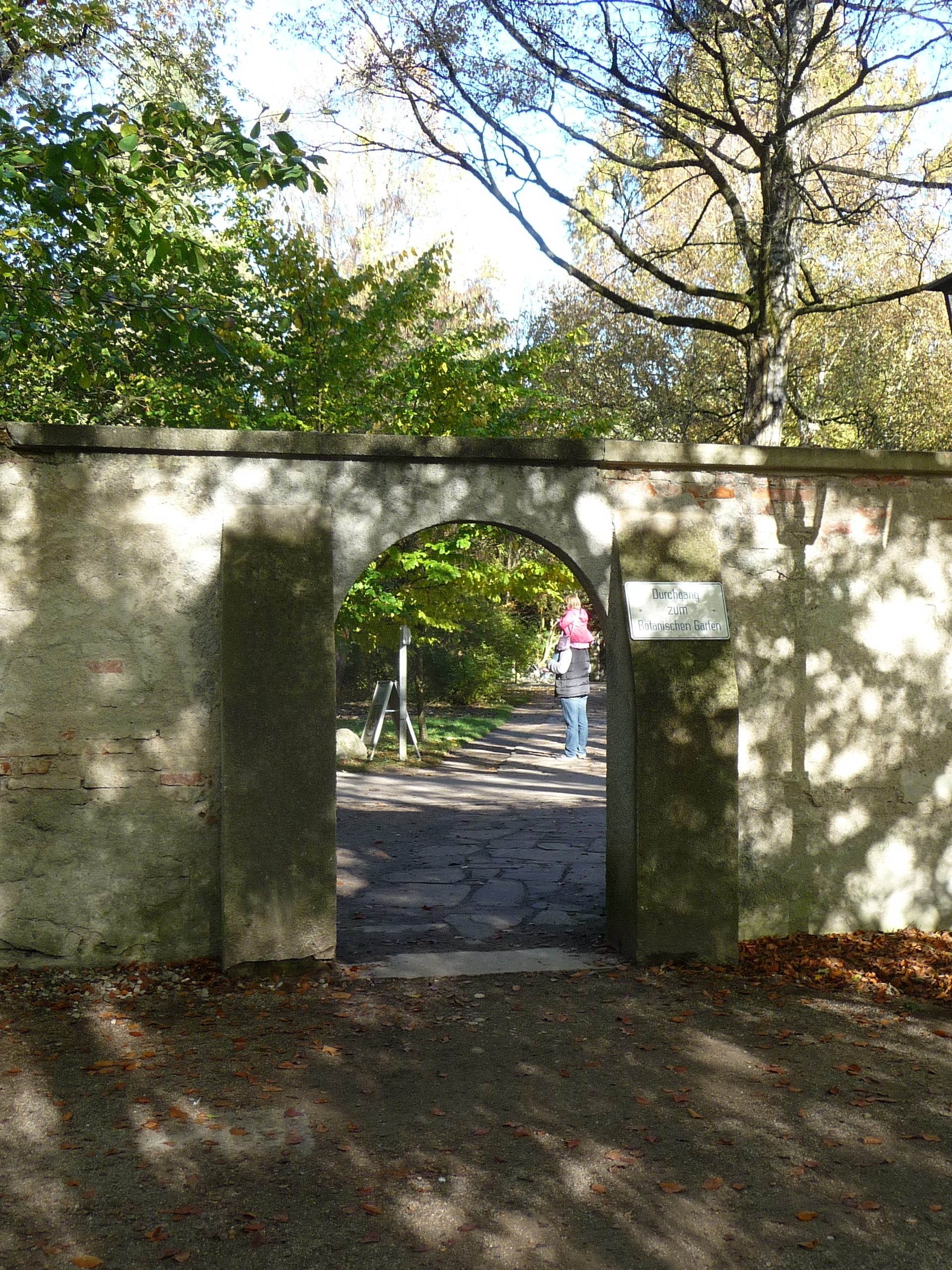 "Zwei Attraktionen werden miteinander verbunden" so lobte die Presse im Frühsommer 1935 den neu geschaffenen Zugang zwischen dem Botanischen Garten und dem Schloßpark Nymphenburg. Seit Herbst 2014 ist die "Südkasse" gesperrt.